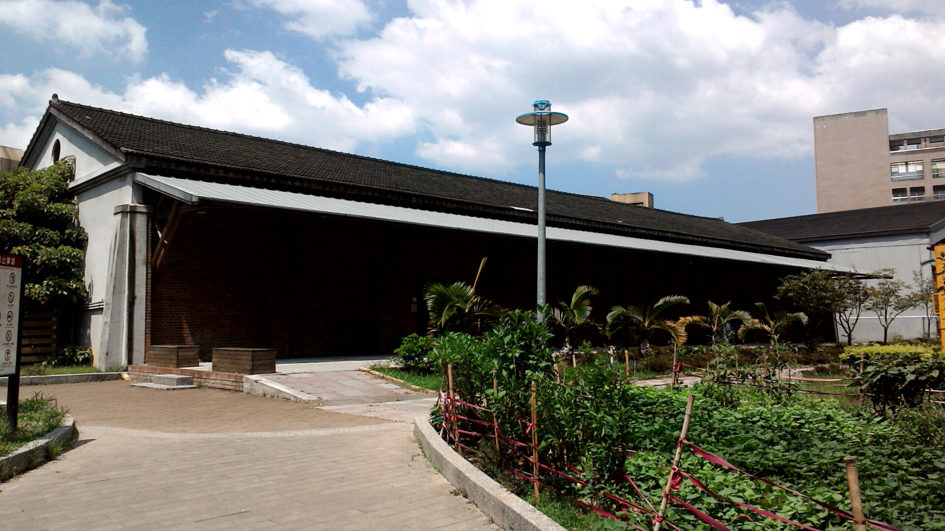 糖廍文化園區A棟倉庫,台北市萬華區大理次分區糖廍里